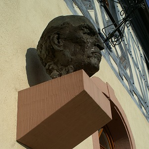 Büste von Carl Zuckmayer an der Eingangstür der Ortsverwaltung in Nackenheim Sonstiges: ...